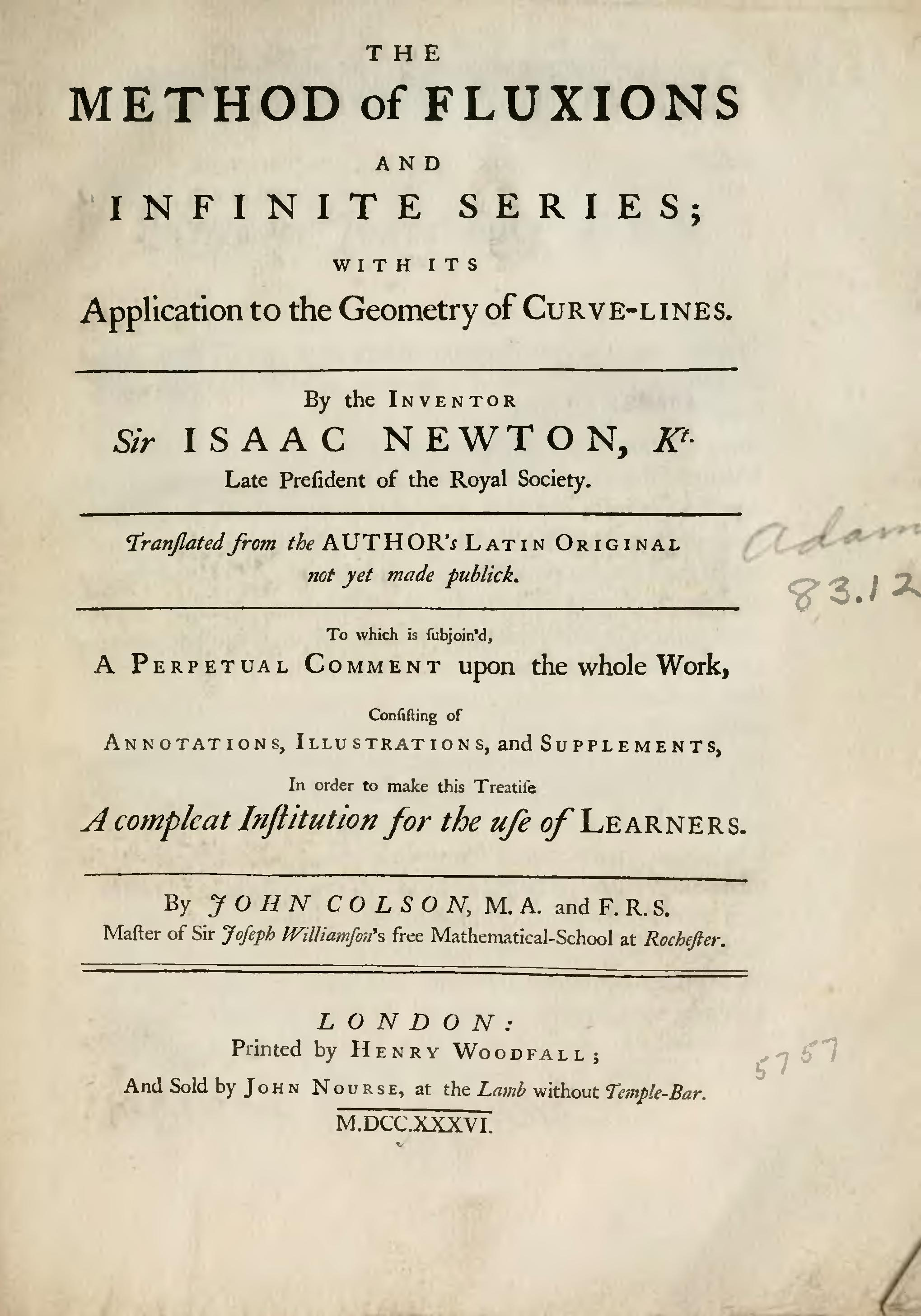 Tapa original de "The method of fluxions and infinite series" de Isaac Newton publicada en 1736